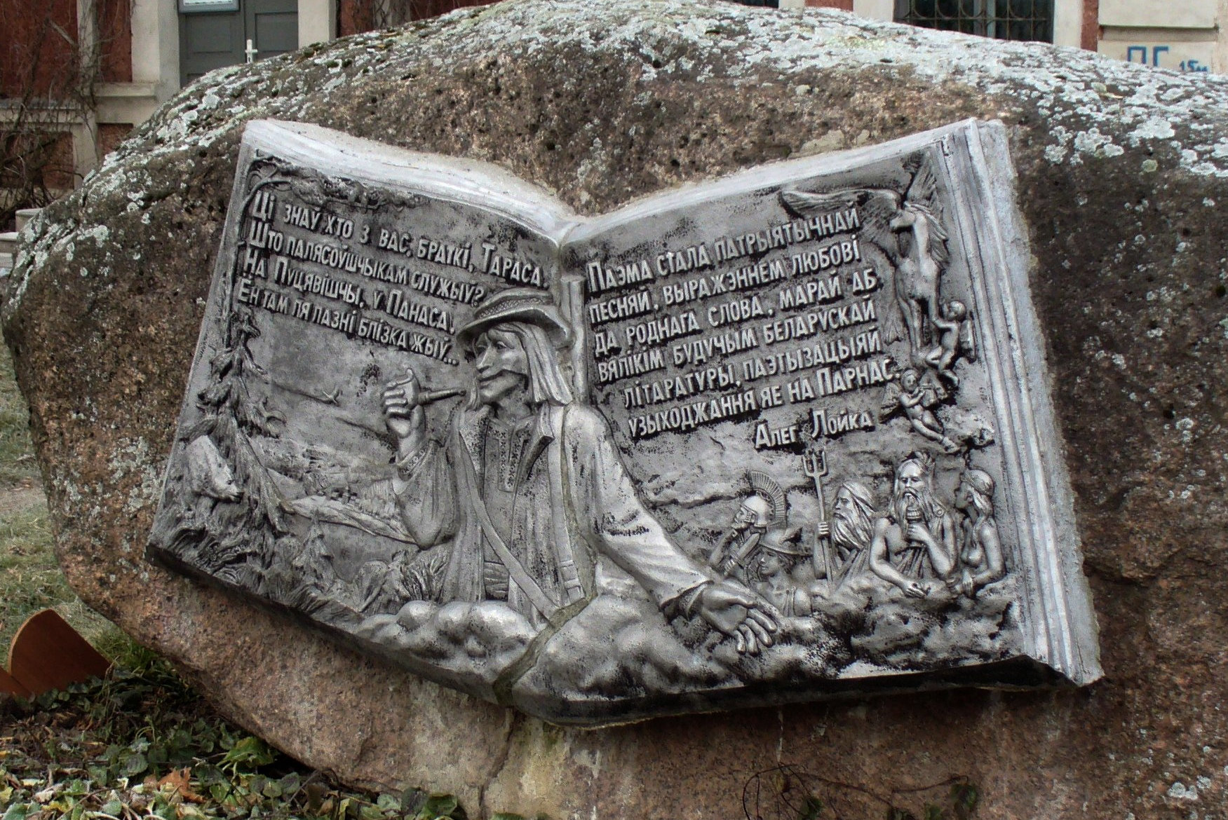 Памятный камень-валун в г. Городок витебской обл.